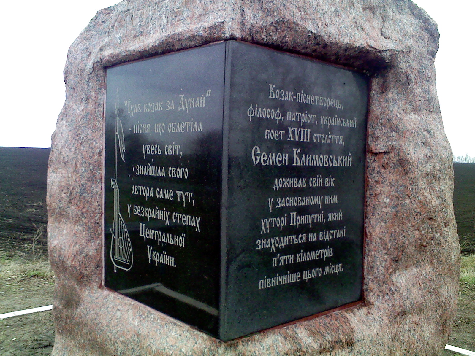 Пам'ятний камінь в с. Мошорине Знам'янського району Кіровоградської області.